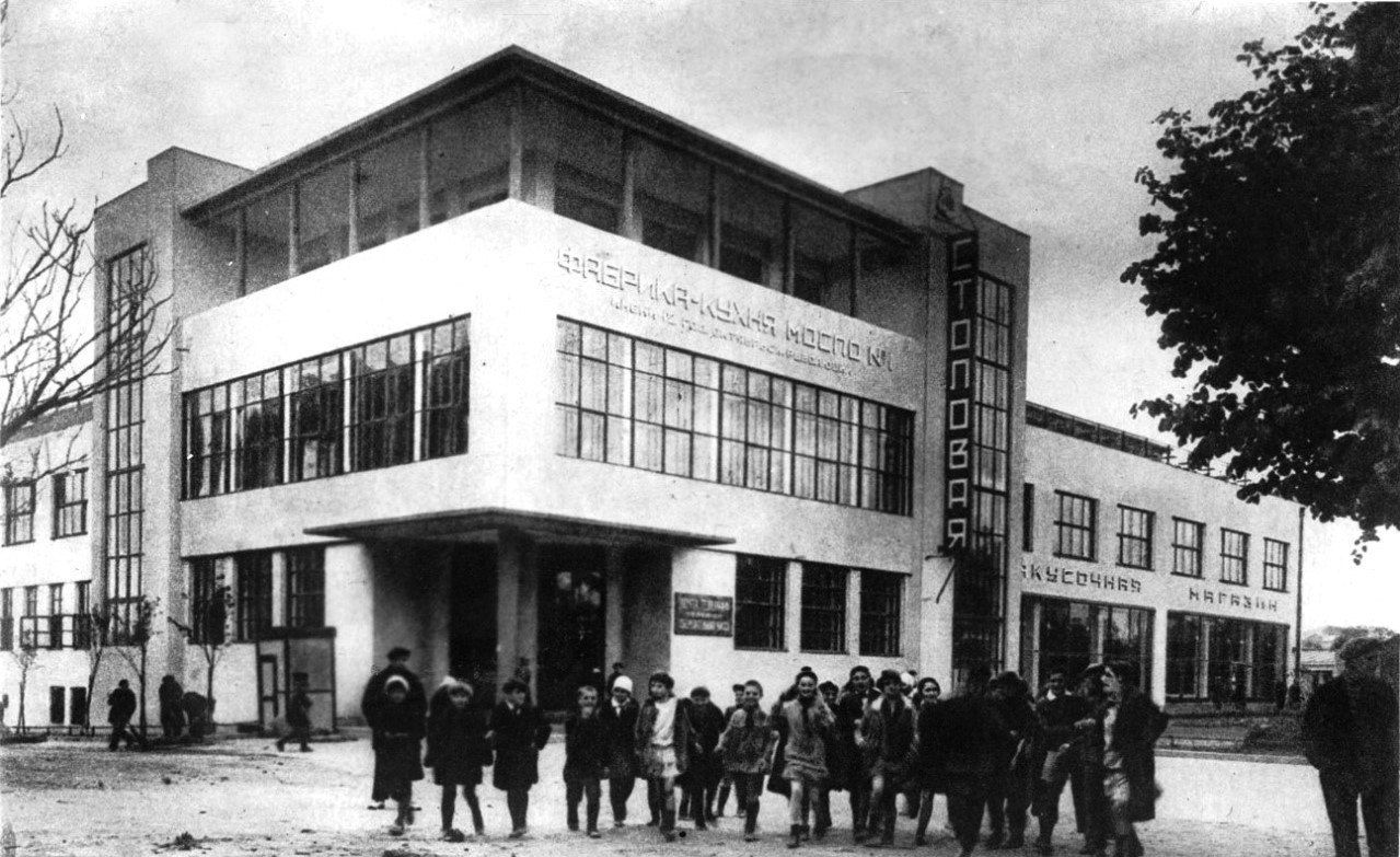 Фабрика-кухня №1, Ленинградский проспект, 7, Москва